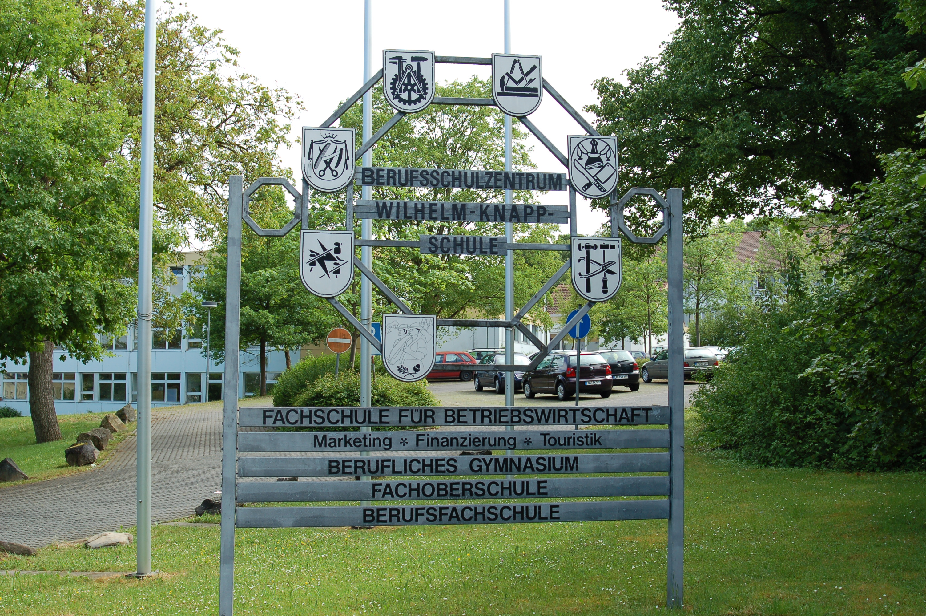 Schild der Wilhelm Knapp Schule Nr. 1